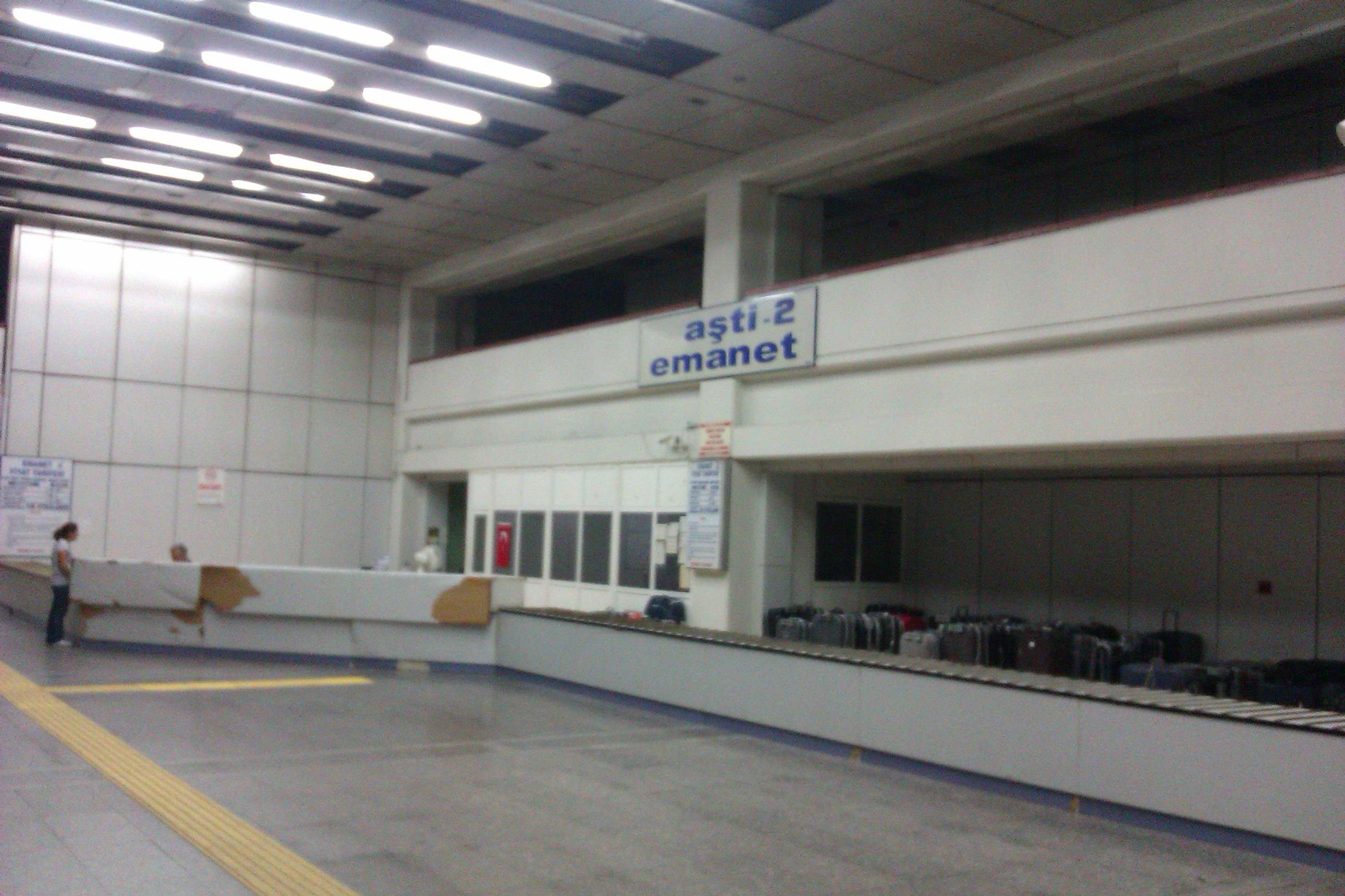 Ankara Şehirlerarası otobüs terminali emanet eşya bölümü